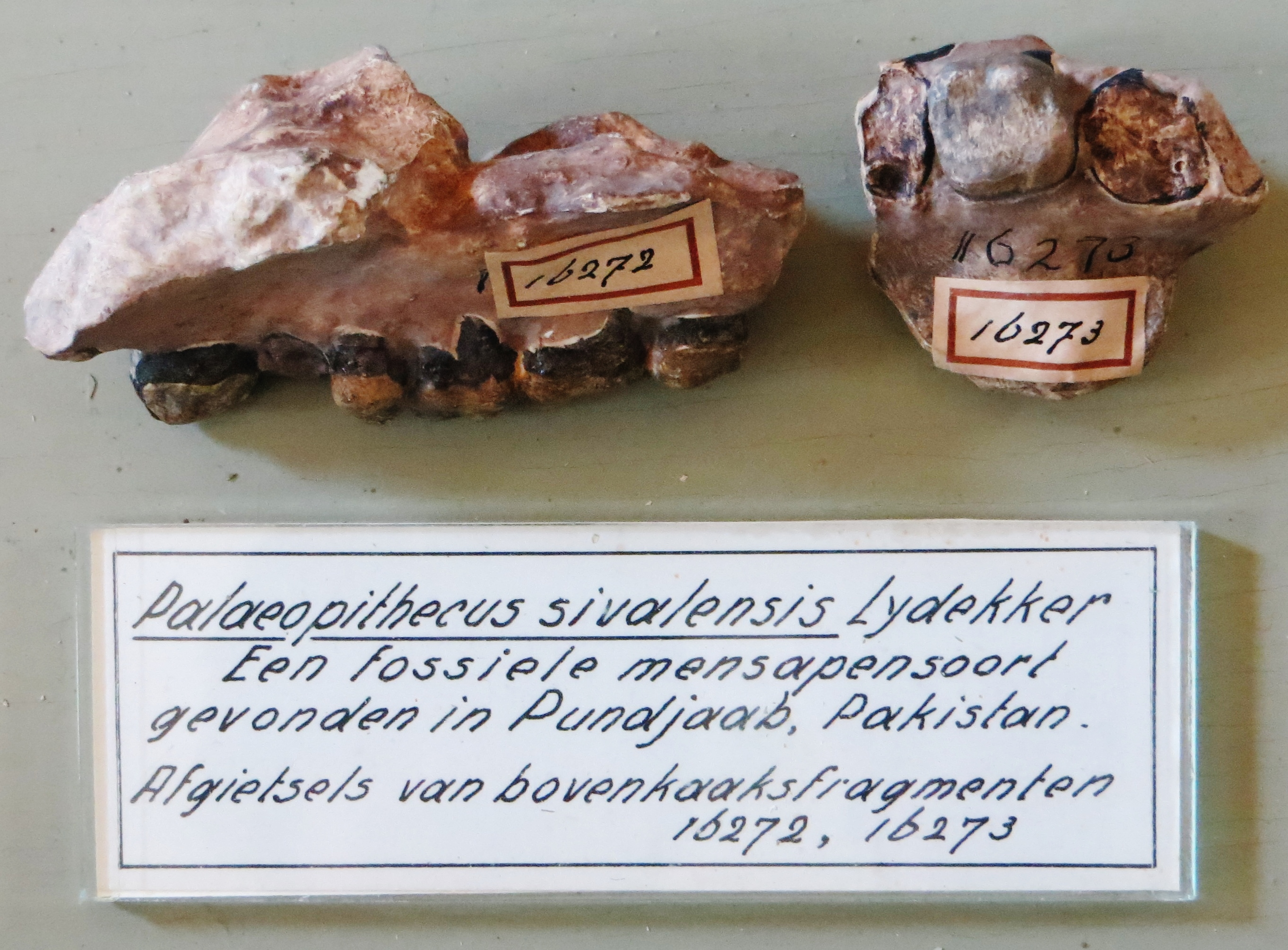 Fossil of Palaeopithecus, an extinct primate- Took the picture at Teylers Museum, Haarlem